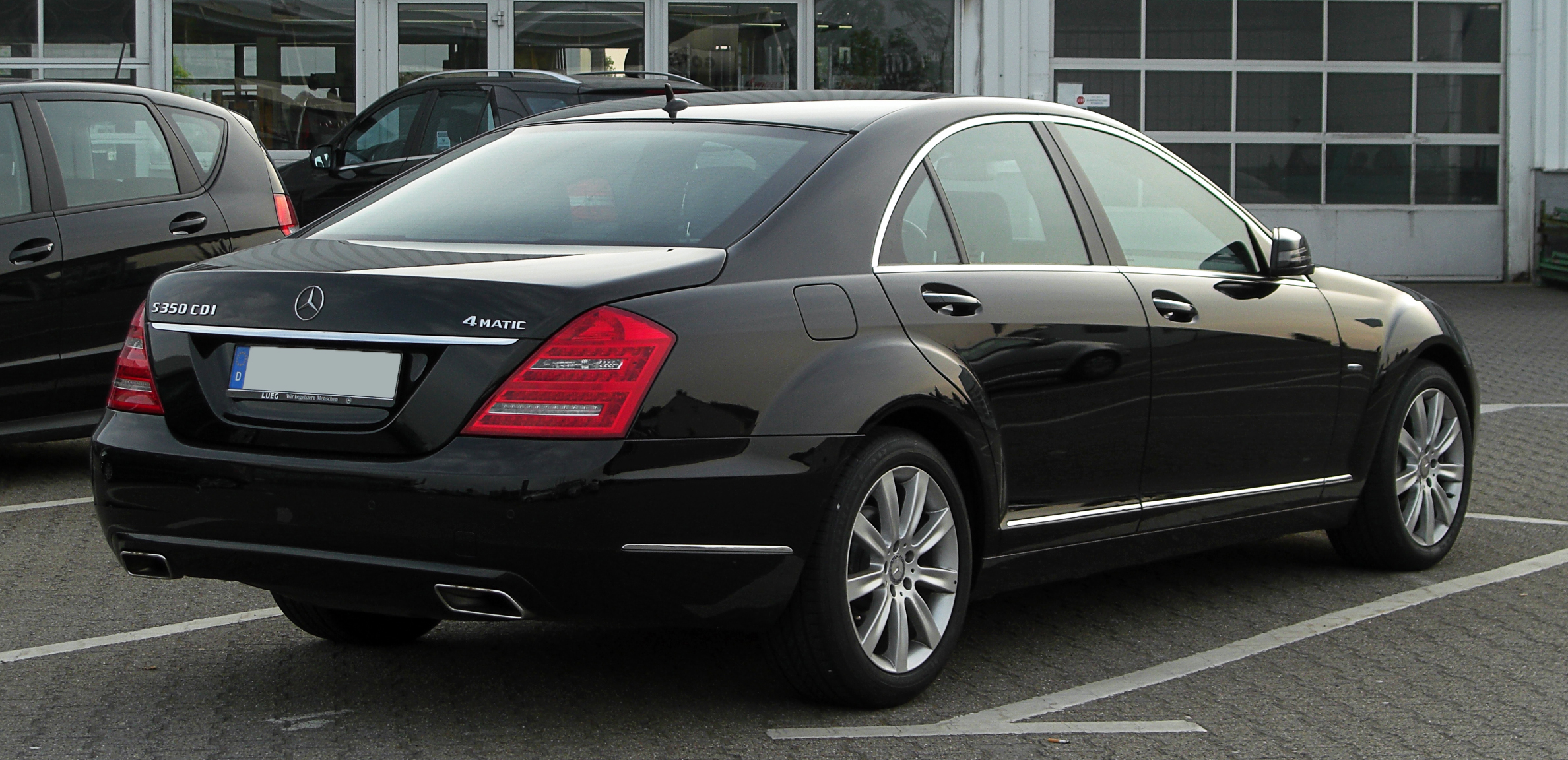 Mercedes-Benz S 350 CDI BlueEFFICIENCY 4MATIC (W 221, Facelift)